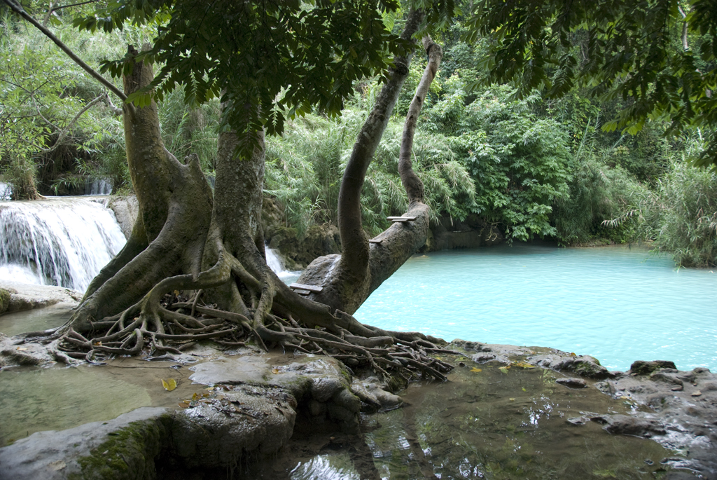 Четвёртый каскад Тат Куанг Си (Fourth Cascade of Kuang Si Falls)